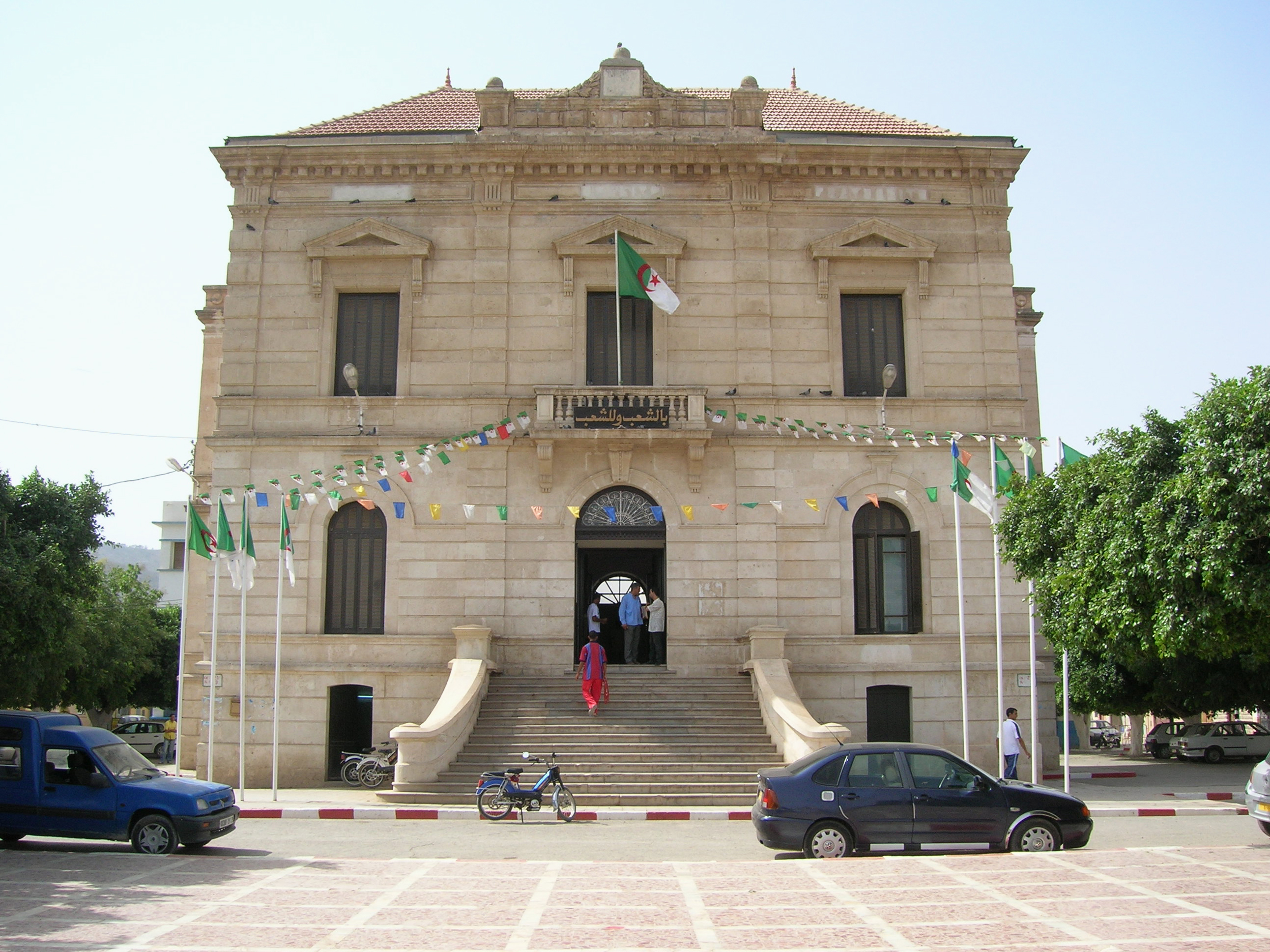 Mairie de Sig (Mascara, Algérie).